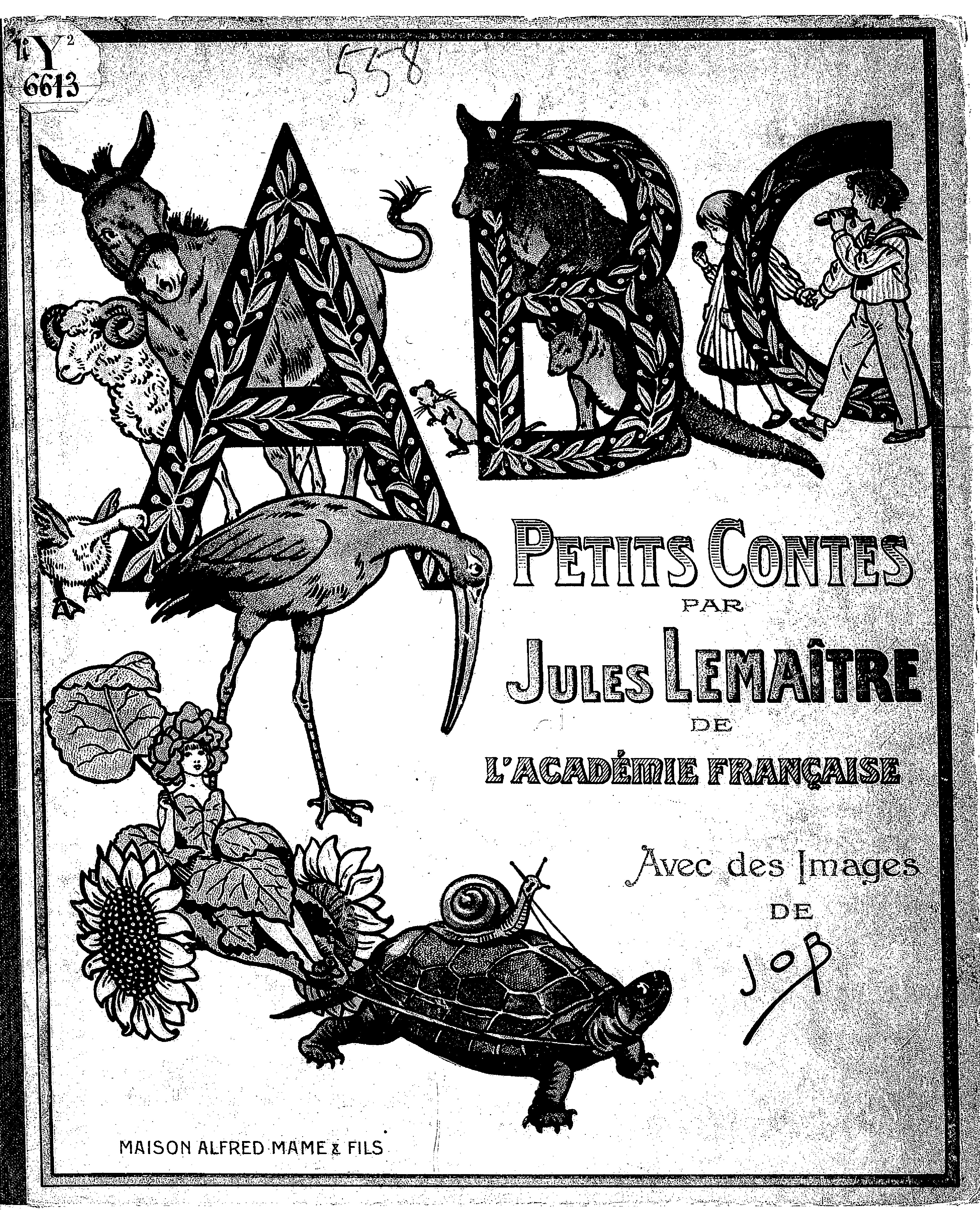 Livre pour Wikisource